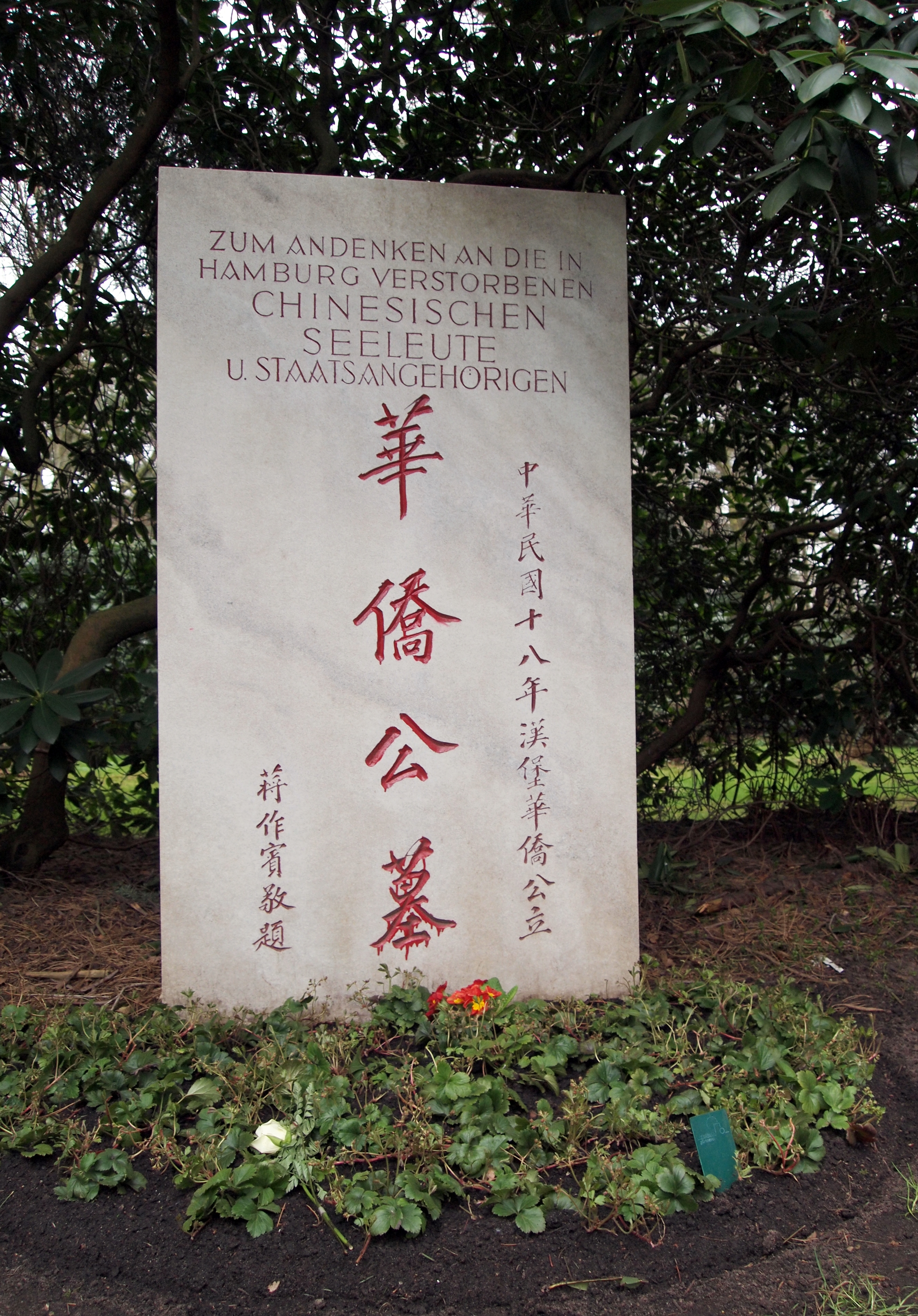 Chinesischer Gedenkstein , Friedhof Ohlsdorf, Planquadrat BP 68 (bei der Eichenallee): „Zum Gedenken an die in Hamburg verstorbenen Seeleute und Staatsangehörige” (1929).